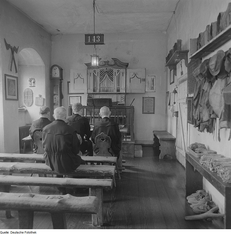 Original image description from the Deutsche Fotothek Freiberg. Stadt- und Bergbaumuseum, Bergmännische Betstube mit einem Orgelpositiv aus dem 17. Jh.